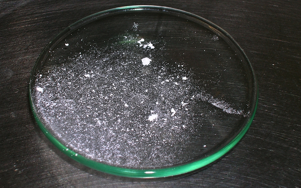 Estradioli benzoas